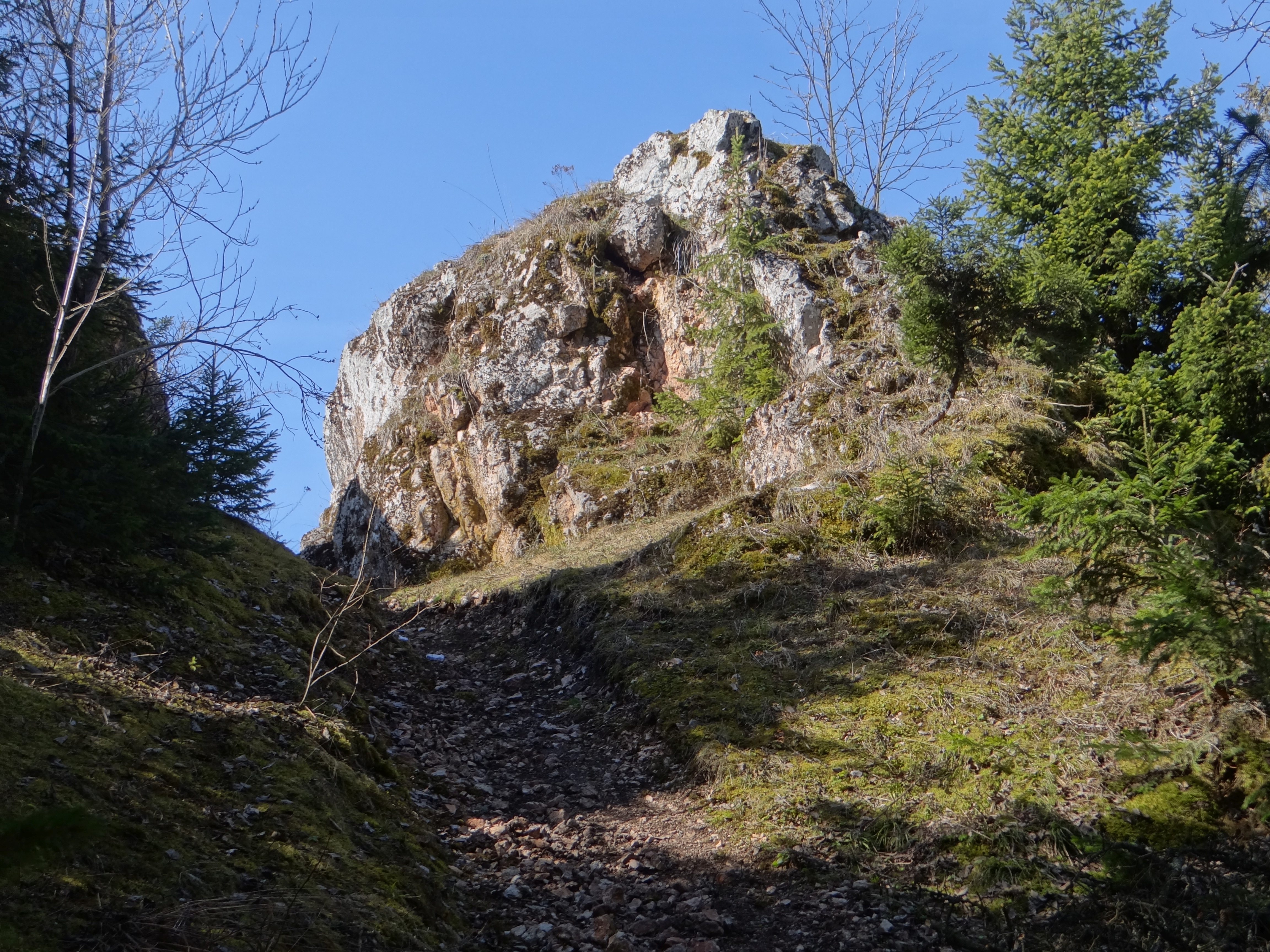 Rezerwat przyrody Rogoźnicka Skałka